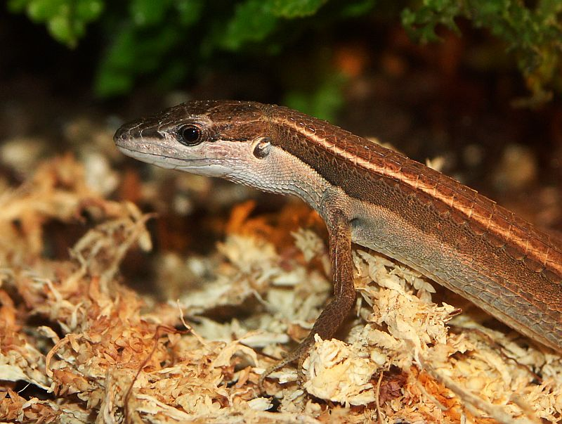 Takydromus sexlineatus female